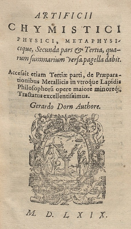 Original image description from the Deutsche FotothekDruckermarke